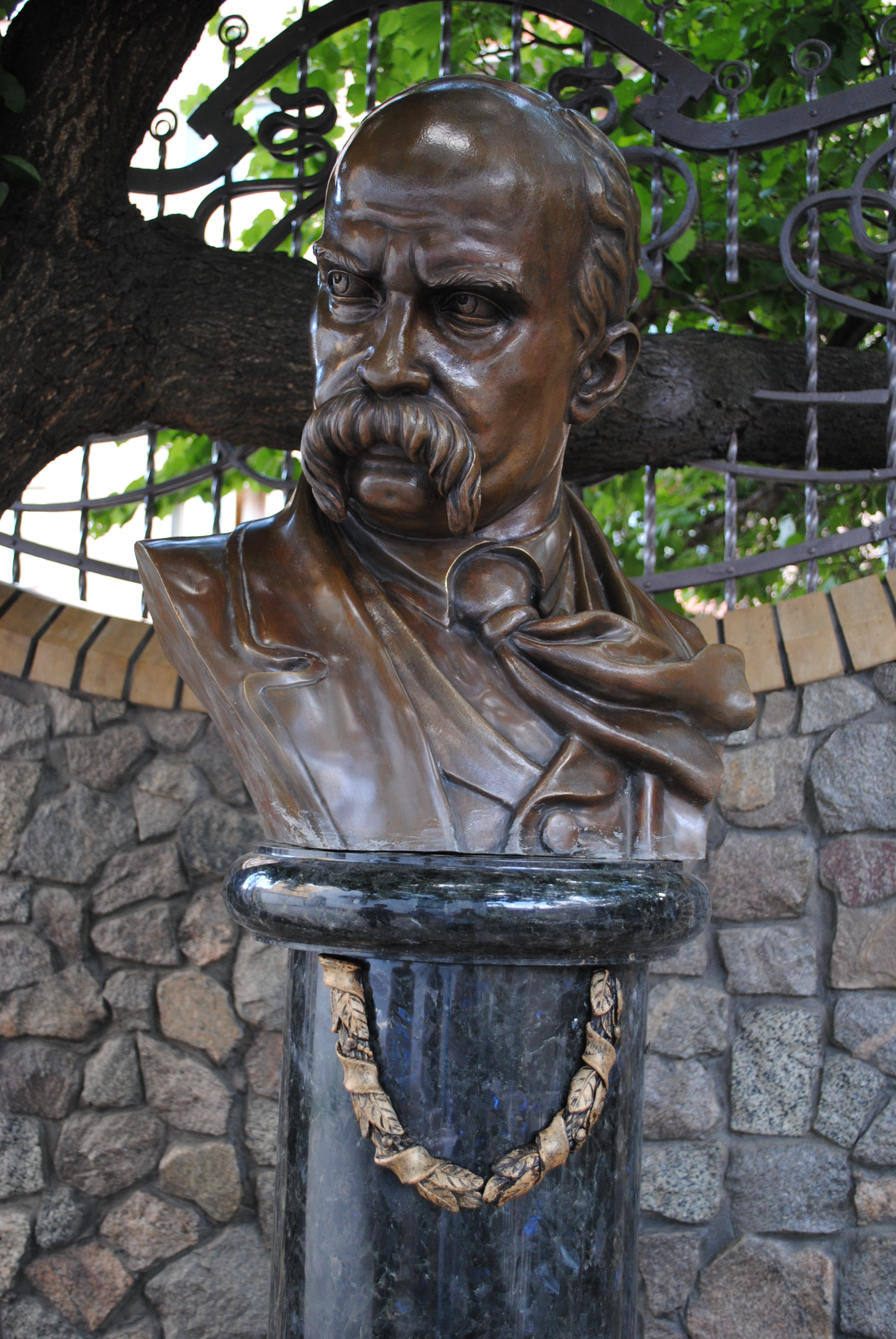 Бюст Т. Г. Шевченко. Автор Катиб Мамедов